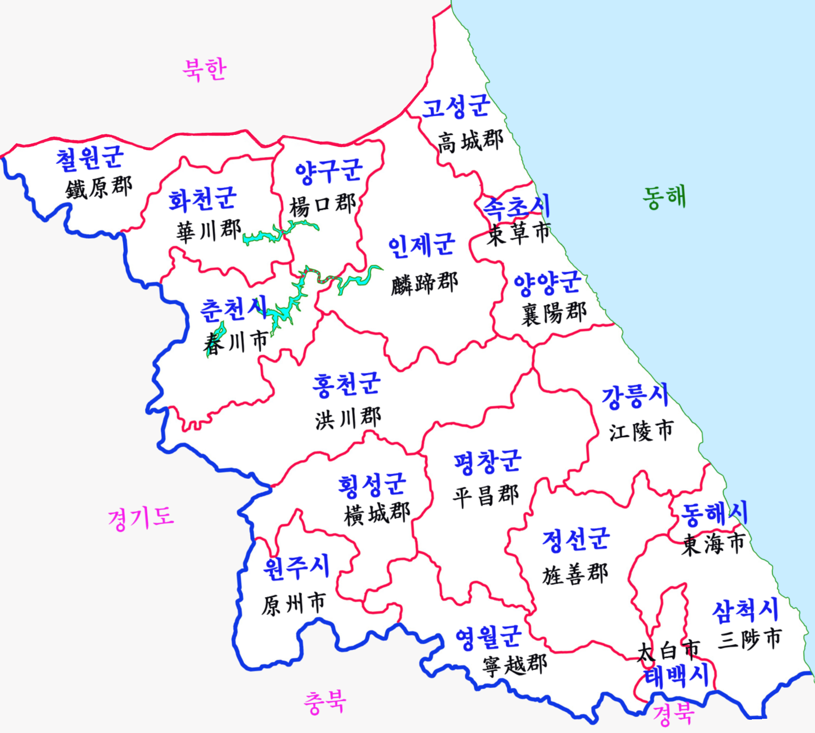 江原道（南）における2012年7月17日現在の行政区画